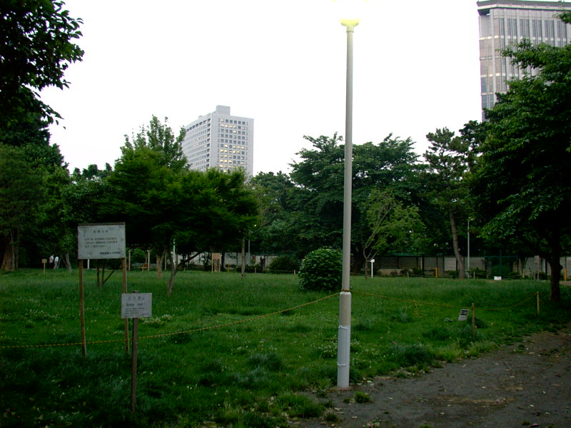 撮影時期2004年、撮影者Moltke 2005年8月7日 (日) 22:41 (UTC)